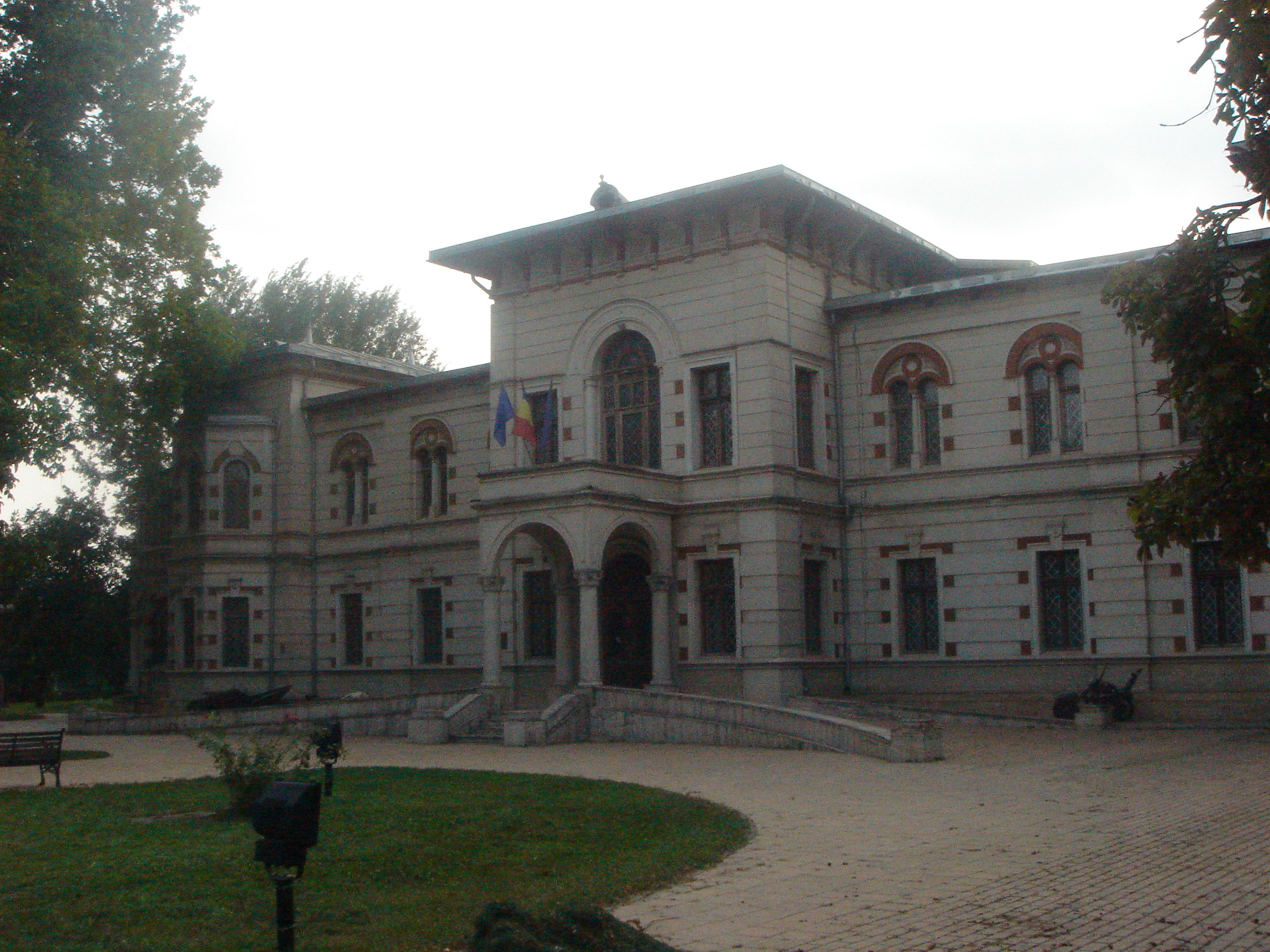 Aflat in vecinatatea Monumentului lui A. Cuza, Palatul Episcopal, este o cladire impunatoare ce gazduieste Muzeul de Arta Vizuala. Deoarece Muzeul va avea din 2013 un sediu nou, Primaria a initiat actiuni pentru mutarea sediului in Palatul Episcopal.